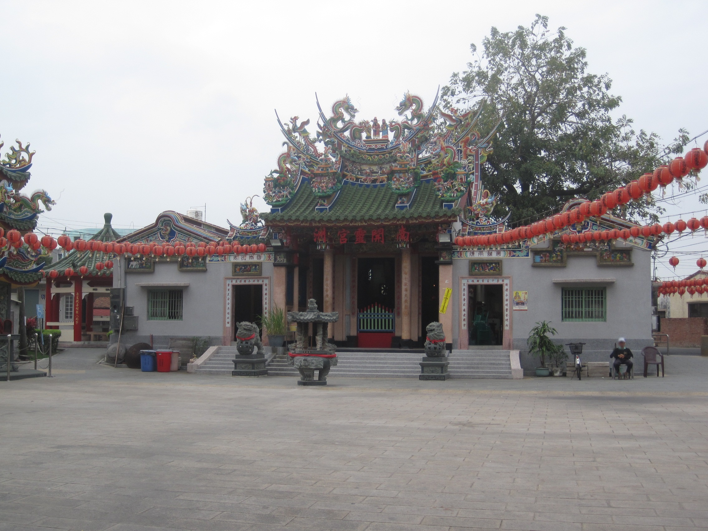 南洲開靈宮